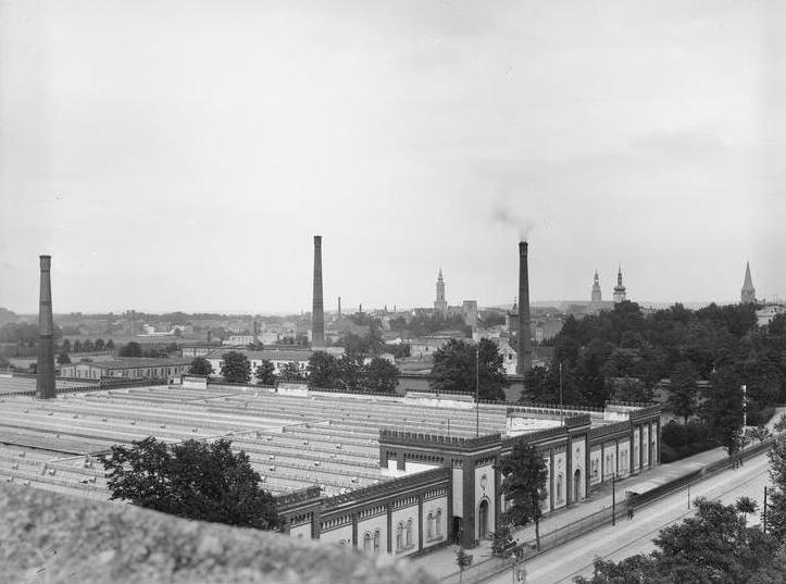 Widok z wieży ciśnień Zakładów Przemysłu Bawełnianego „Frotex” („S. Fränkel” Tischzeug & Leinwand Fabrik).